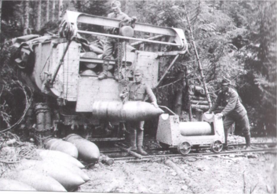 38 cm Granaten für Belagerungshaubitze M 16